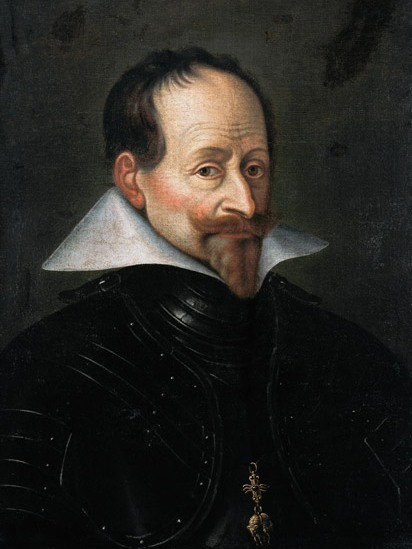 Maximilian I. (* 17. April 1573 in München; † 27. September 1651 in Ingolstadt) war seit 1597 Herzog von Bayern und seit 1623 Kurfürst des Heiligen Römischen Reiches.